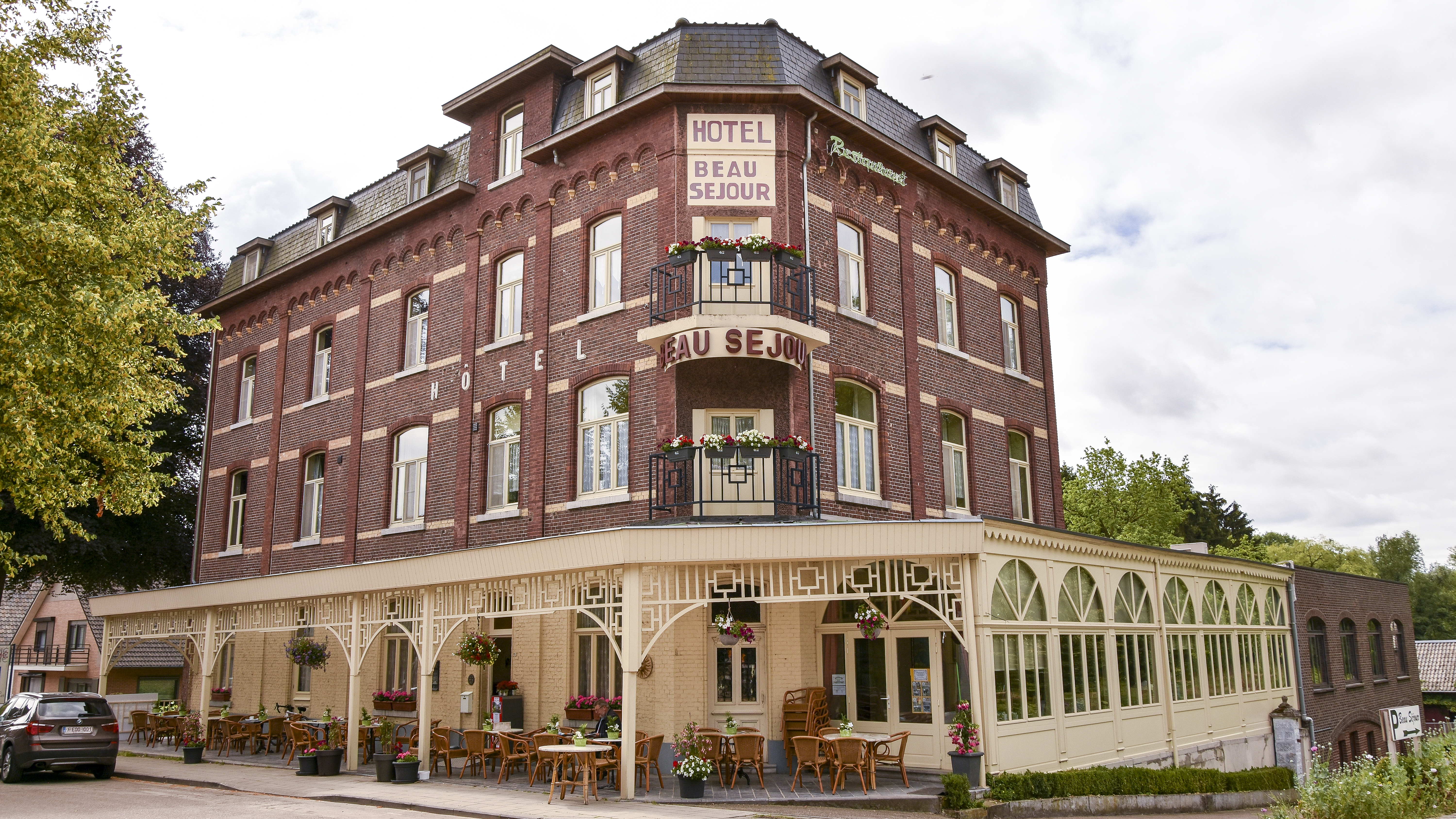 Beau Séjour Lanklaar 18-06-2018